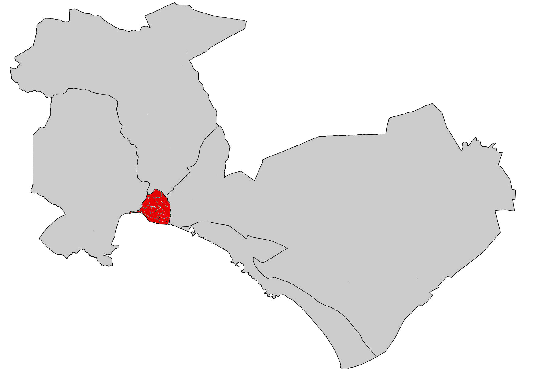 Districte del Centre (Palma).